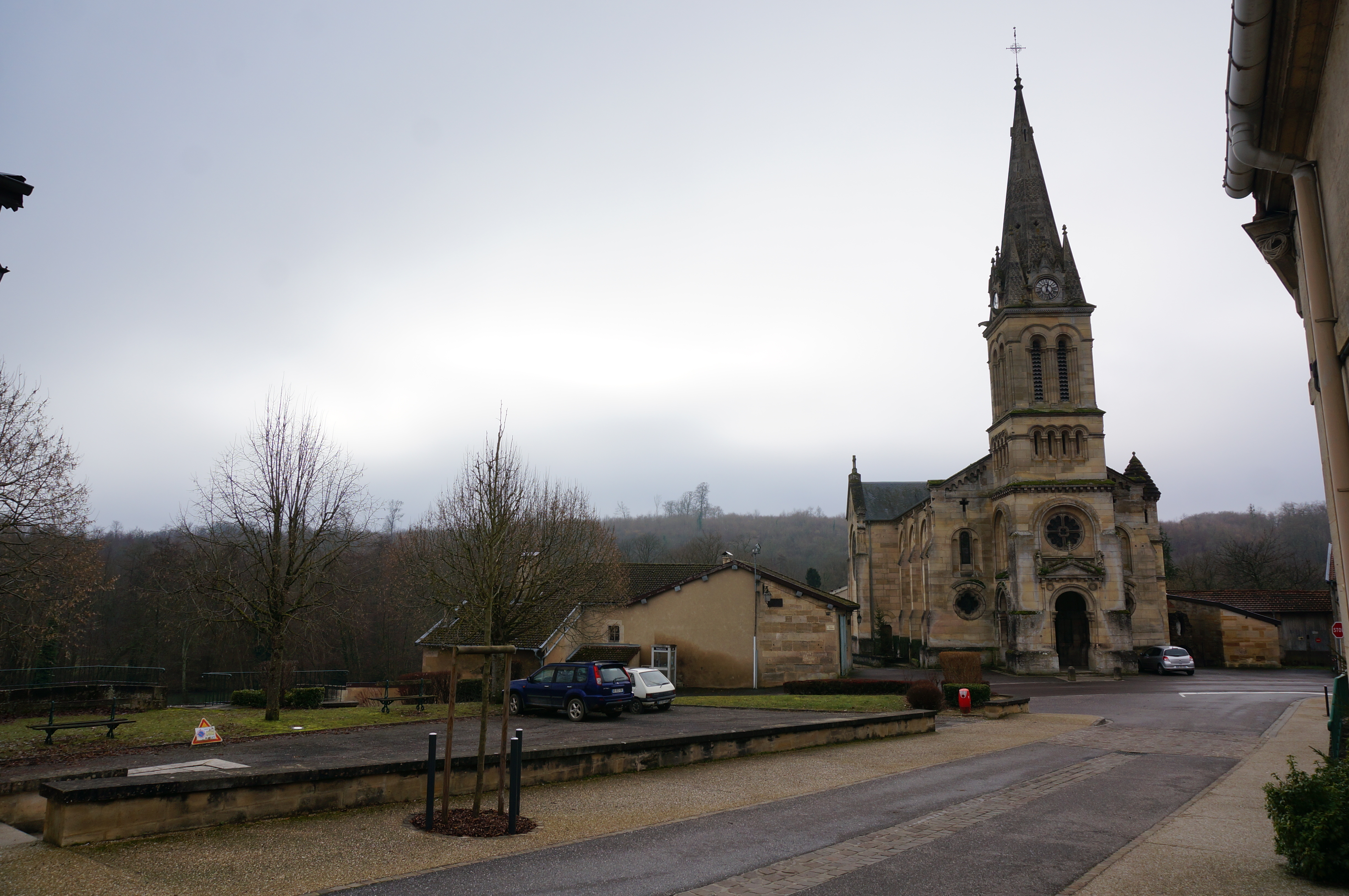 vues à Ville-sur-Saulx.